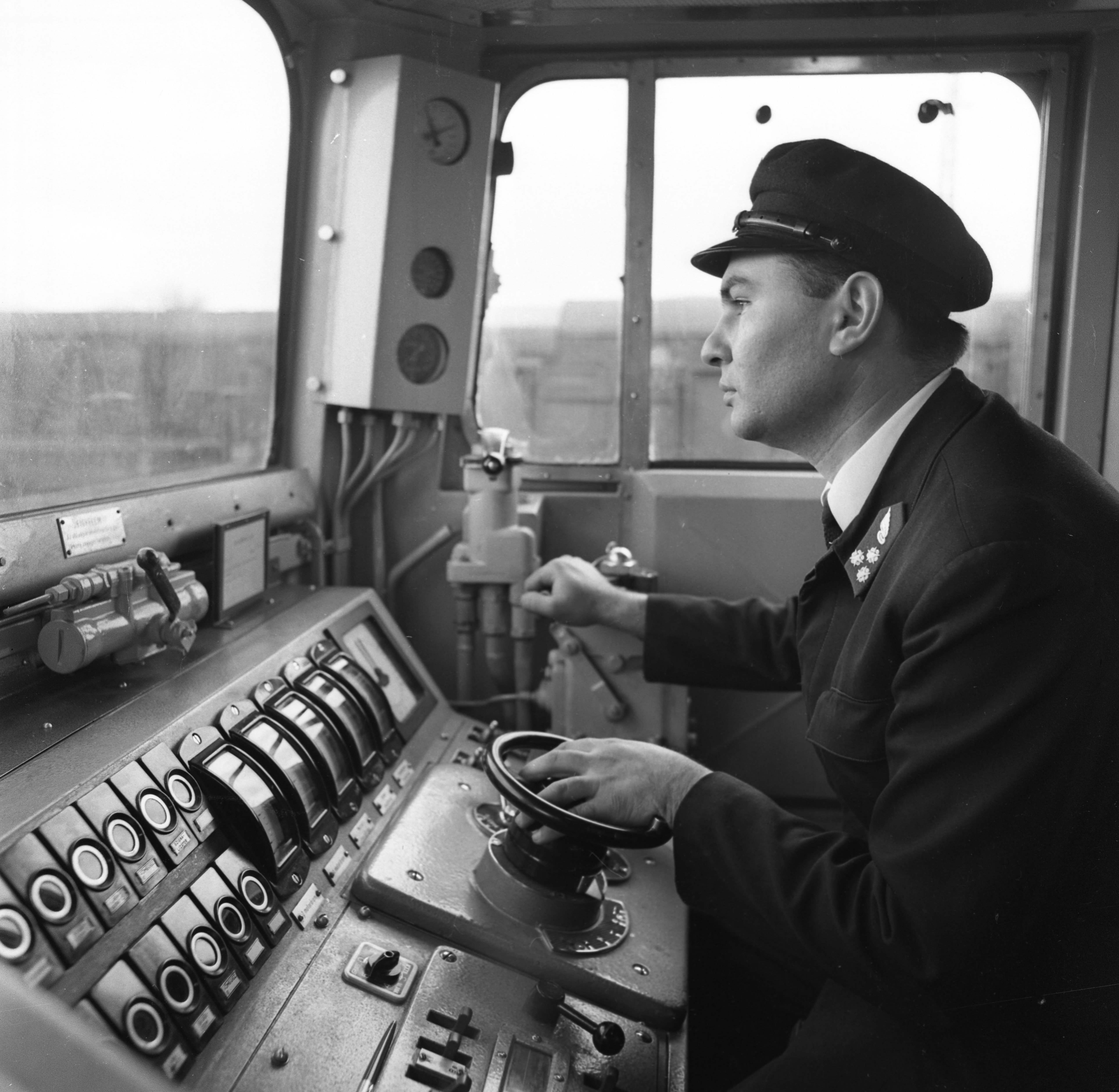 V43 villanymozdony vezetőállása. A felvétel a Vác-Szob vasútvonal villamosításának átadásakor 1971. december 22.-én készült. Location: Hungary Tags: train-driver Title: V43 villanymozdony vezetőállása. A felvétel a Vác-Szob vasútvonal villamosításának átadásakor 1971. december 22.-én készült.